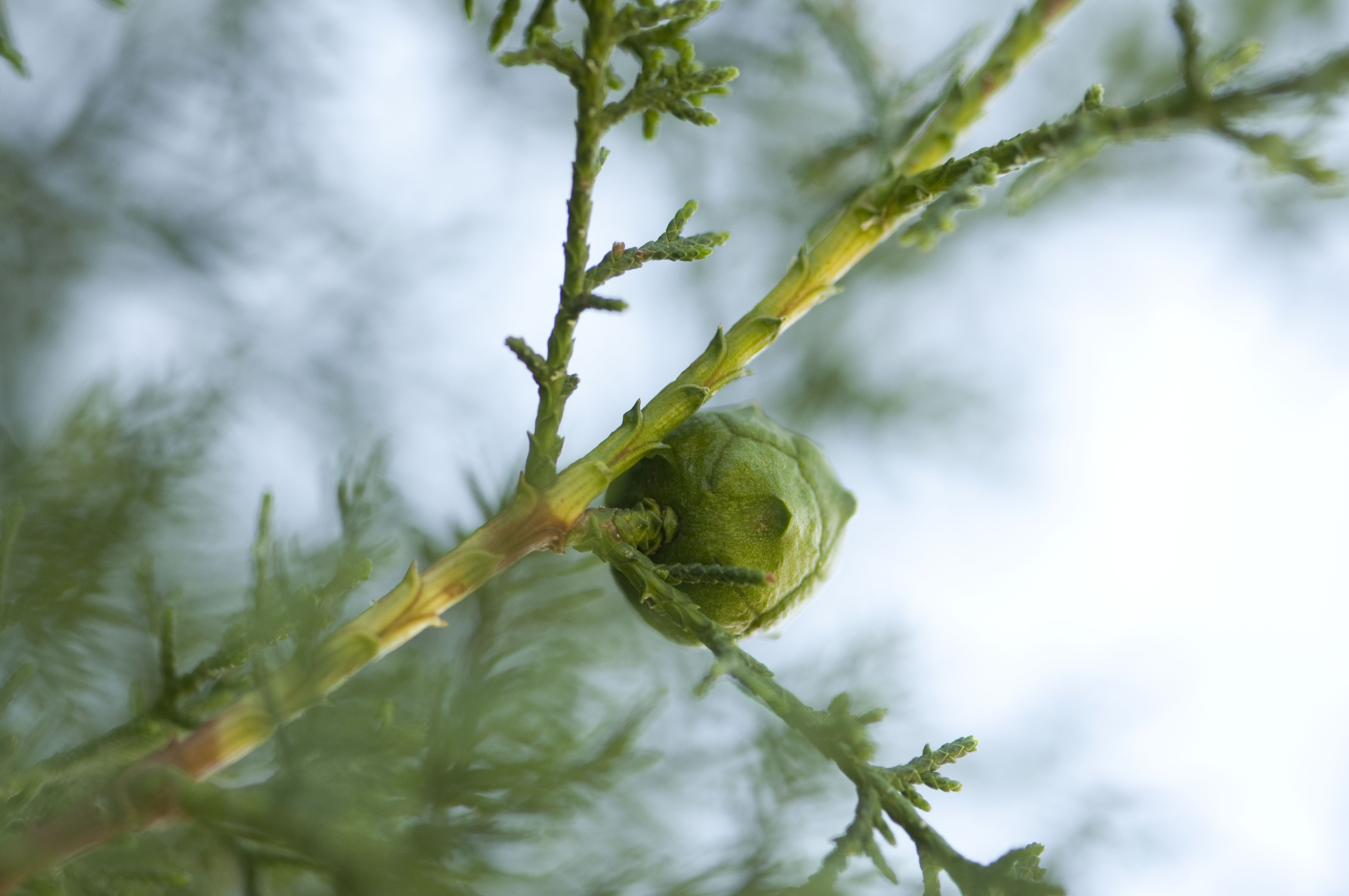 Vista d'un con